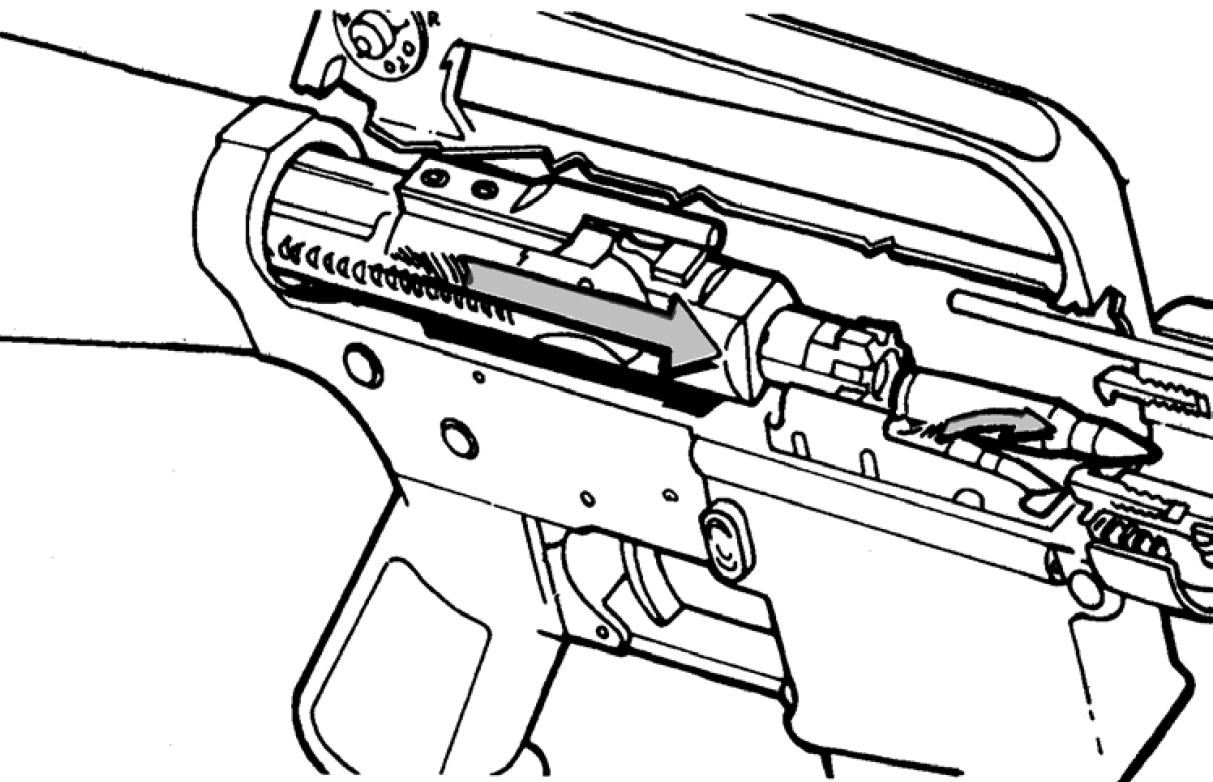 M16 rifle feeding